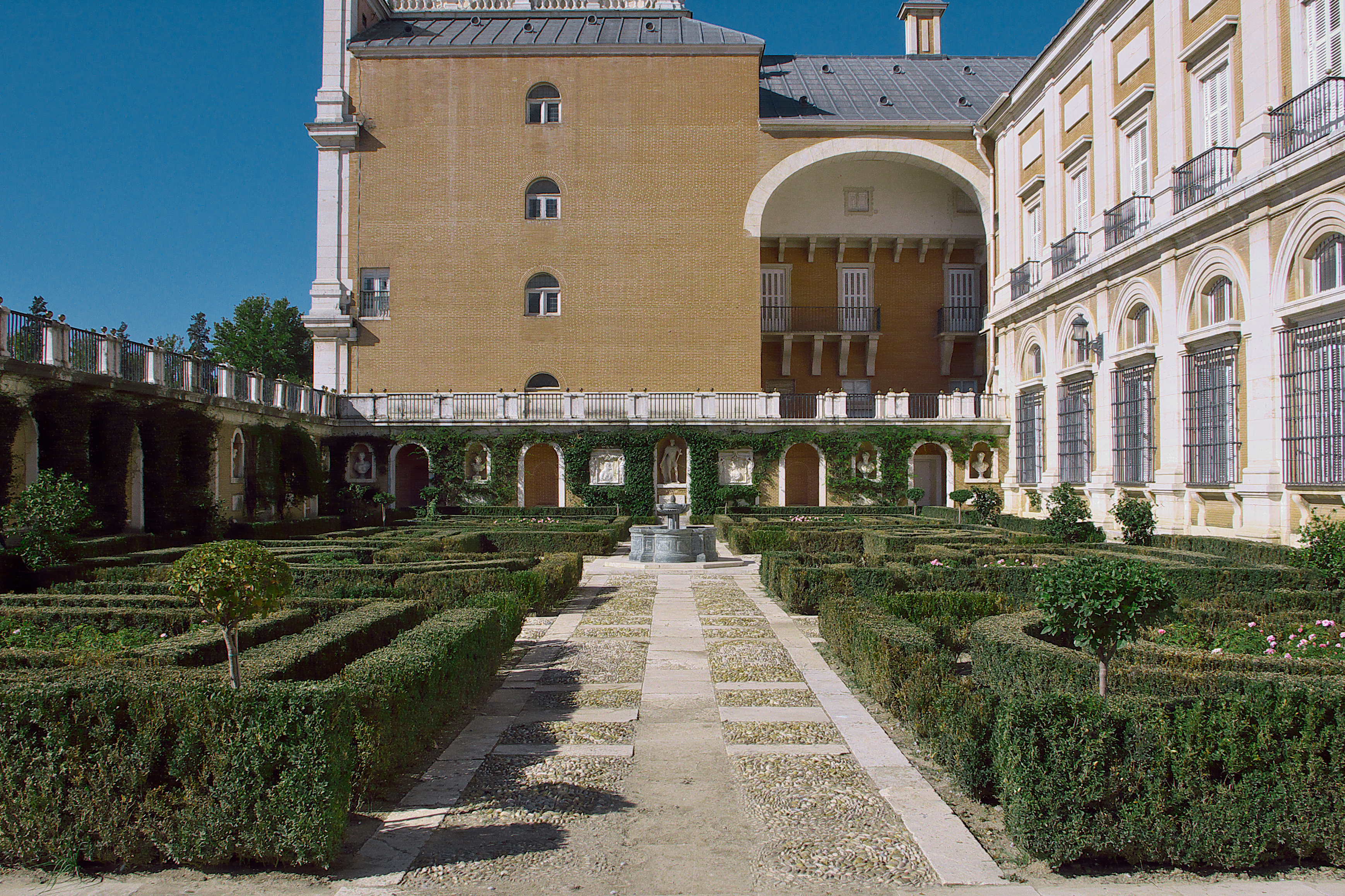 Un jardín proyectado por Juan Bautista de Toledo con formas italianizantes.